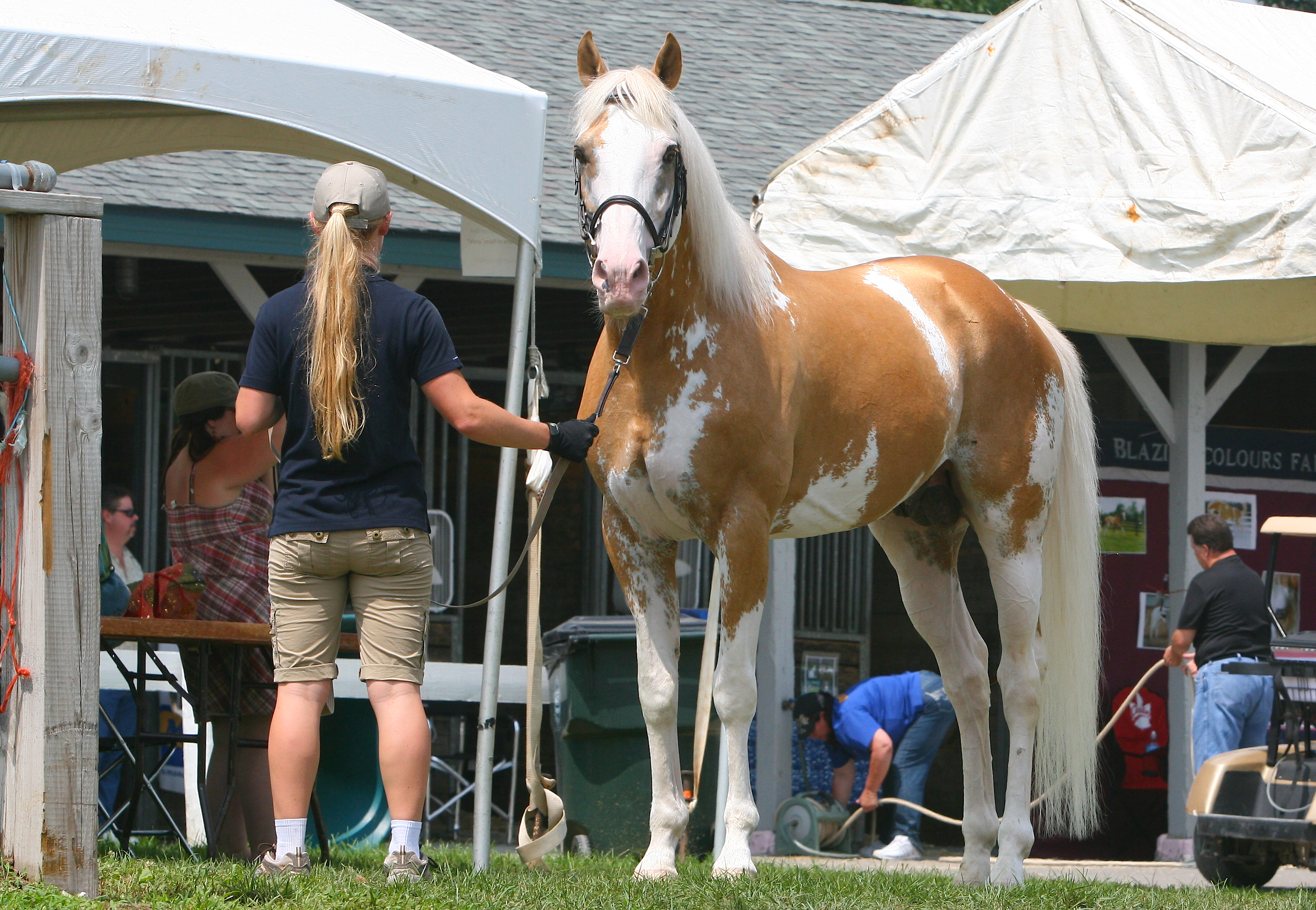 Palomino sabino TB stallion. Home page